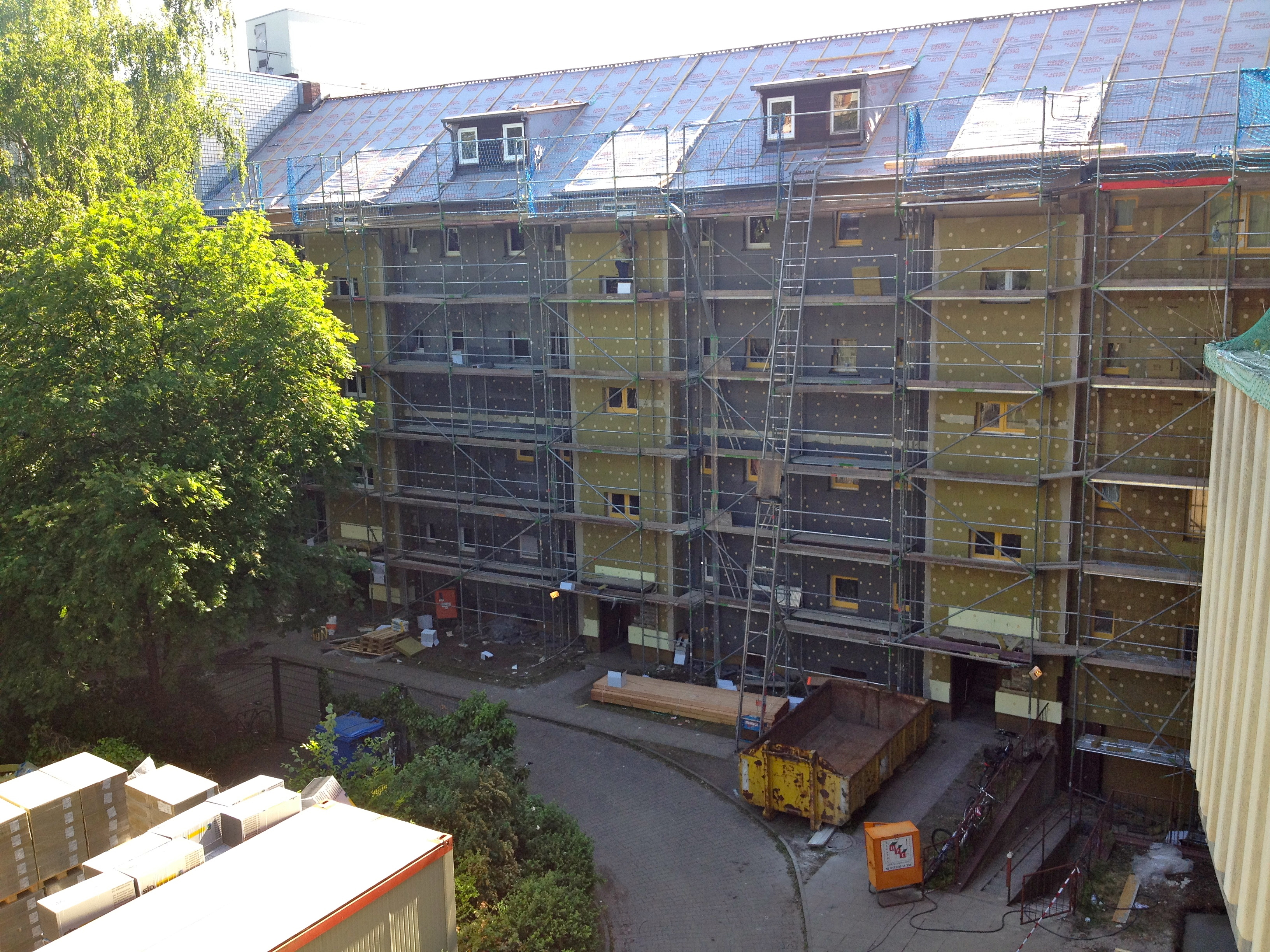 Wärmedämmung eines Mehrfamilienhaus von 1957. Kombination von verschiedenen Dämmstoffen (Polystyrol/Steinwolle)